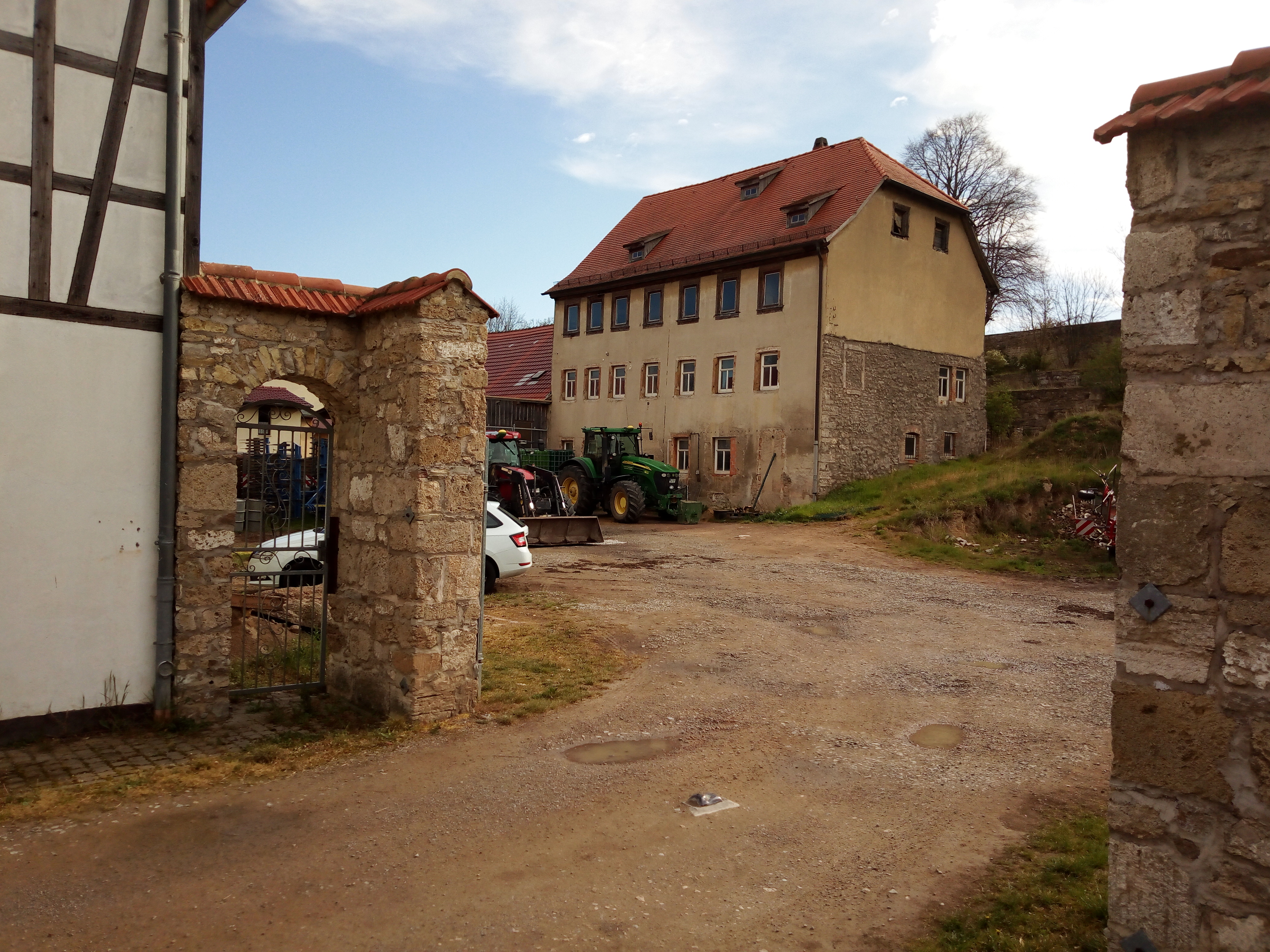 Burgtonna, Rittergut, Gutshaus